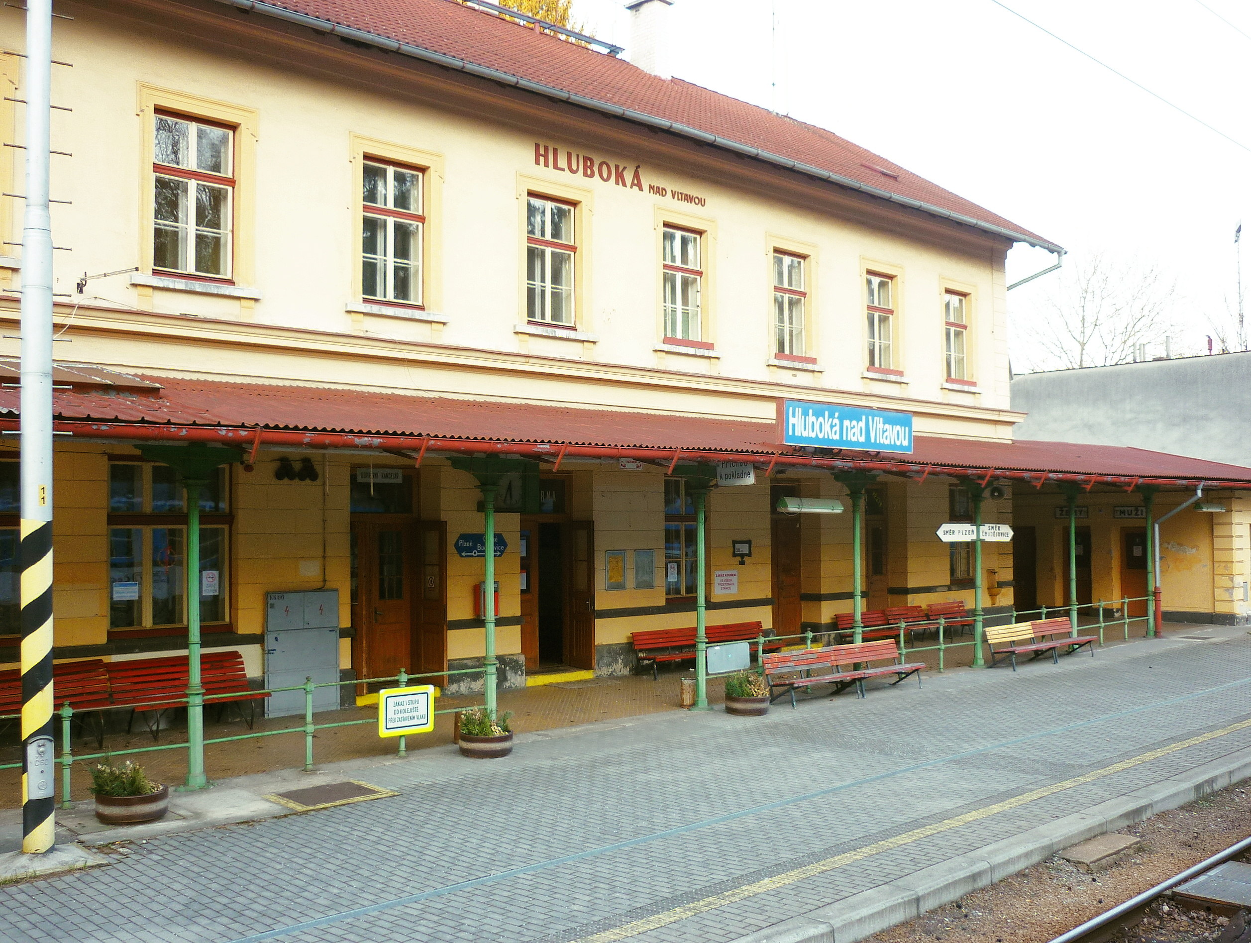 Hluboká nad Vltavou - železniční stanice